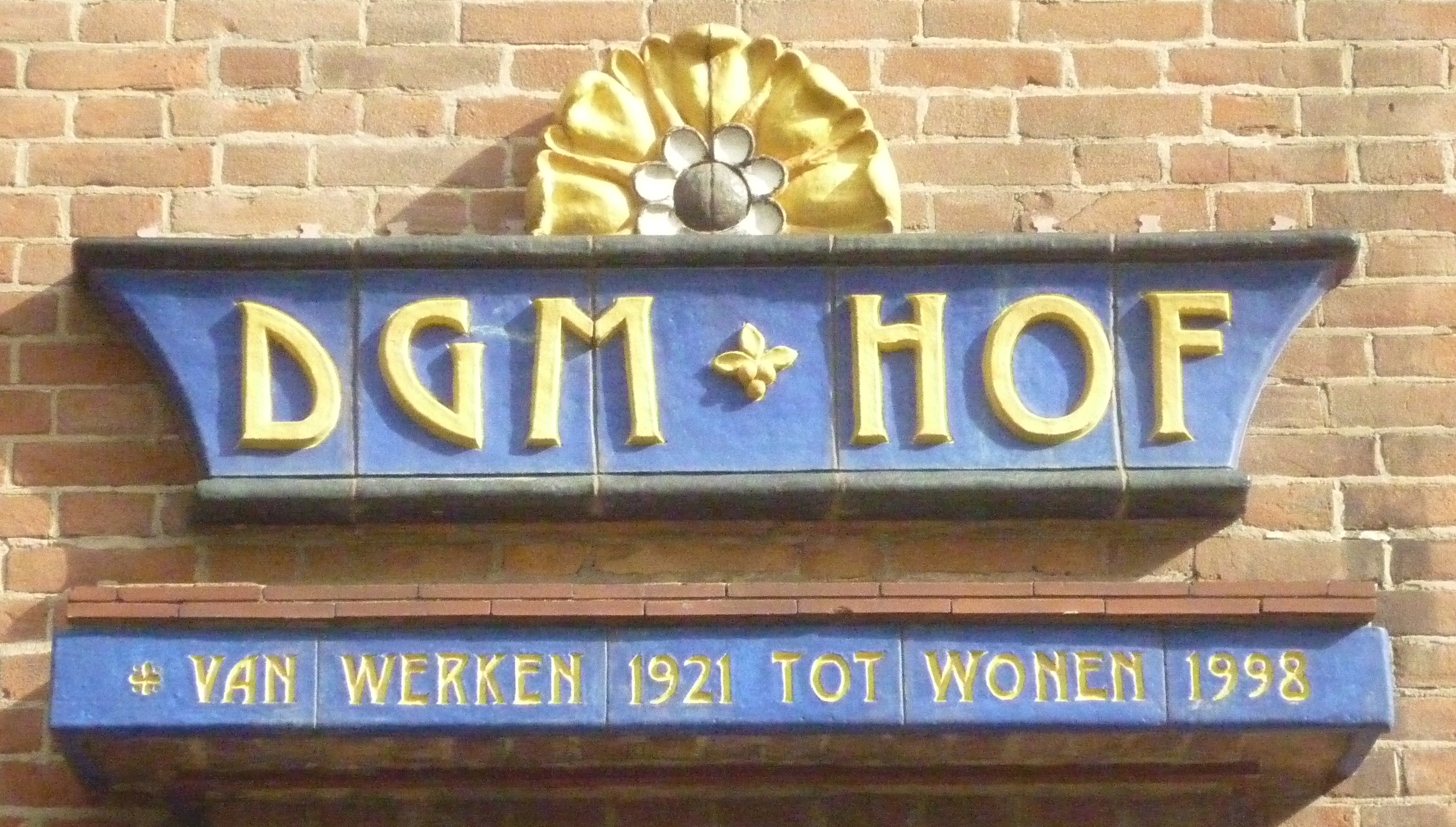 DGM-Hof naambord